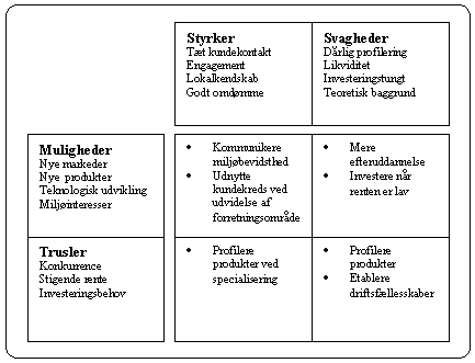 Eksempel paa SWOT-matrix